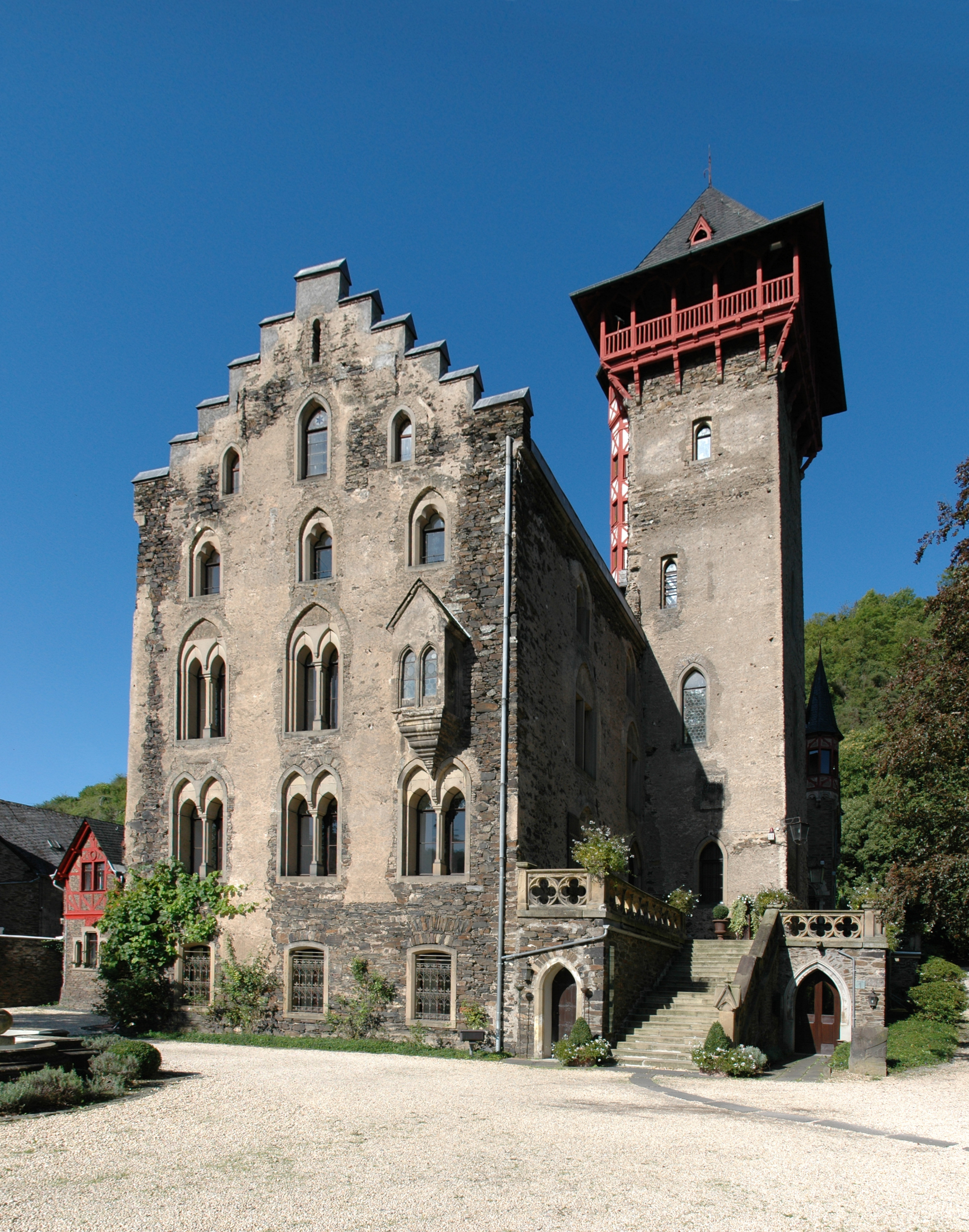 Schloss Liebieg in Gondorf an der Mosel, Nordost-Ansicht